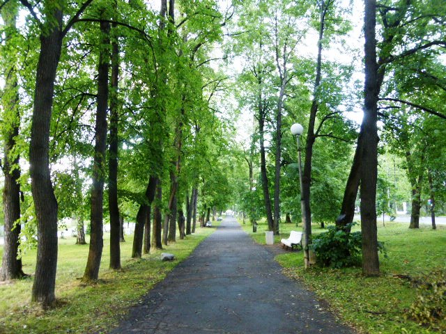 Левашовский бульвар в Петрозаводске